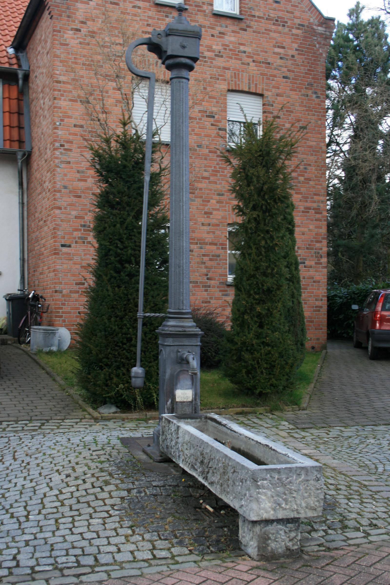 Alte Pumpe in der Brunnenstraße